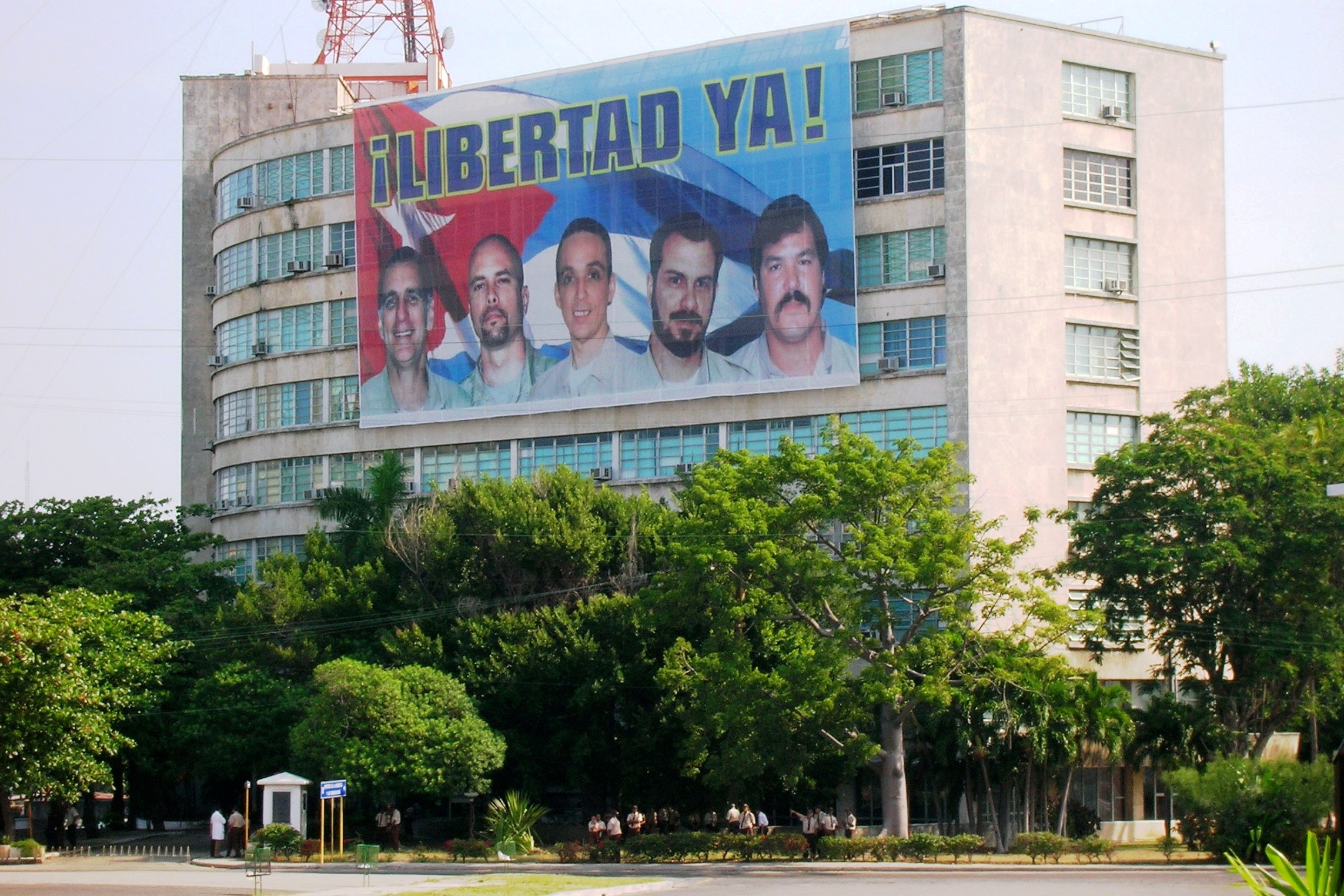 Plaza de la Revolución, L'Avana, Cuba. Pannello con ritratti i cinque cubani detenuti negli Stati Uniti d'America.